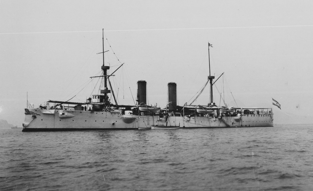 Der argentinische Kreuzer "Nueve de Julio" im Jahr 1910